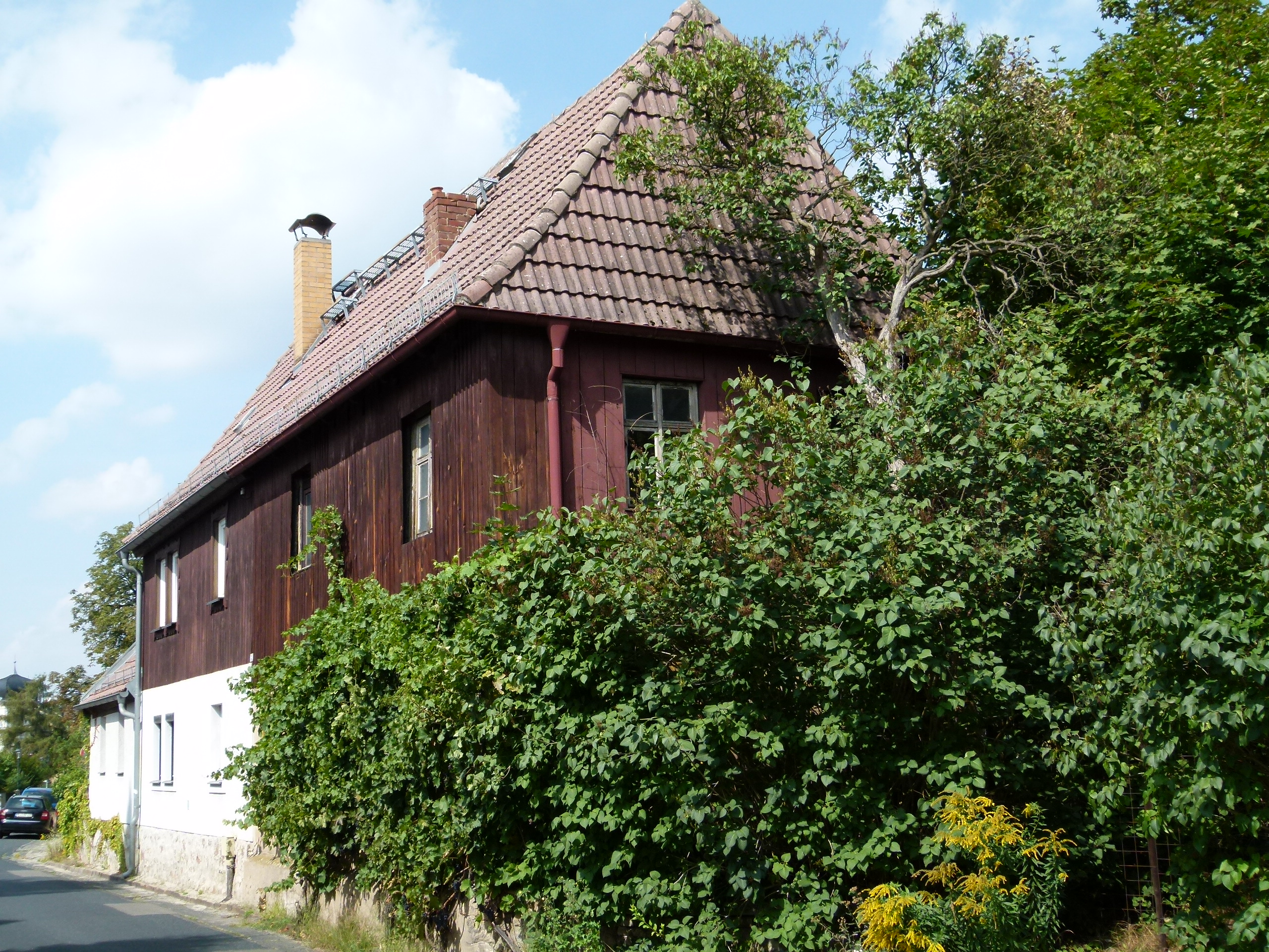 Denkmalgeschütztes Haus, Winzerstraße 24, Radebeul, Sachsen